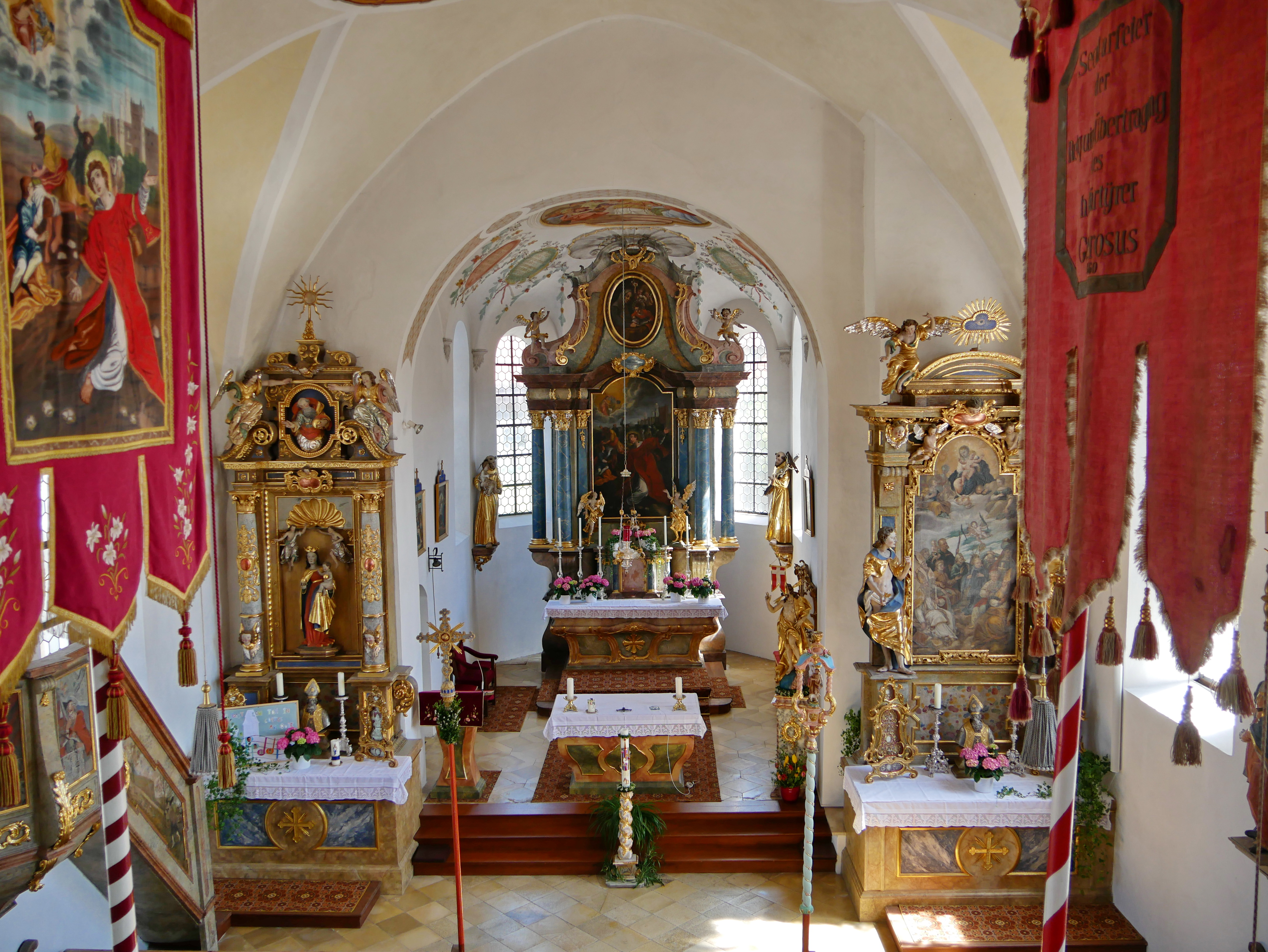 Riegsee, Am Kirchplatz 4, St. Stephan. Innenansicht von der Empore zum Altar. Das Altarbild zeigt die Steinigung des Hl. Stephanus als Folge des Disputs mit den Schriftgelehrten (s. Bild 011)